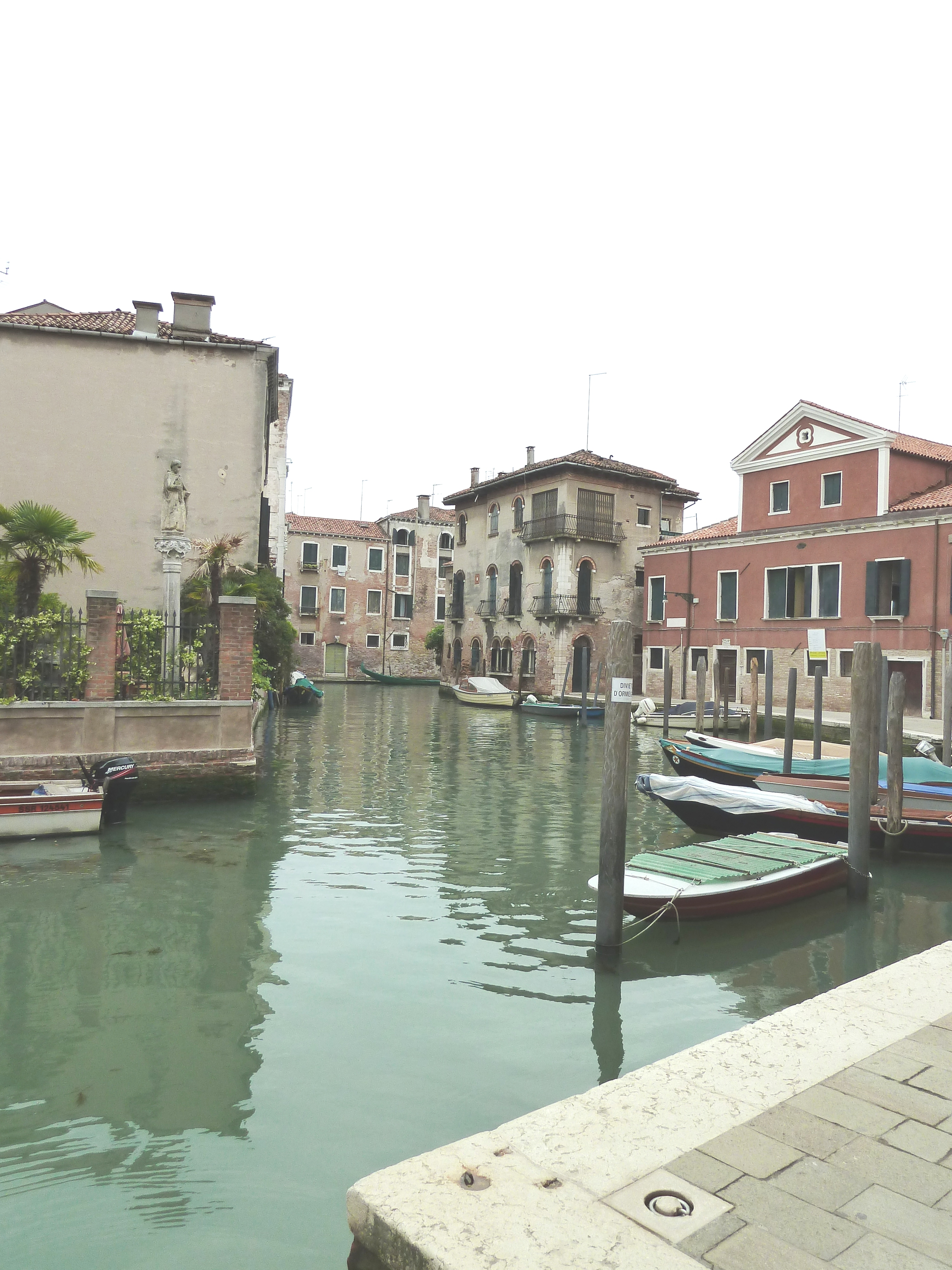 Rio del Malcanton (Venice)